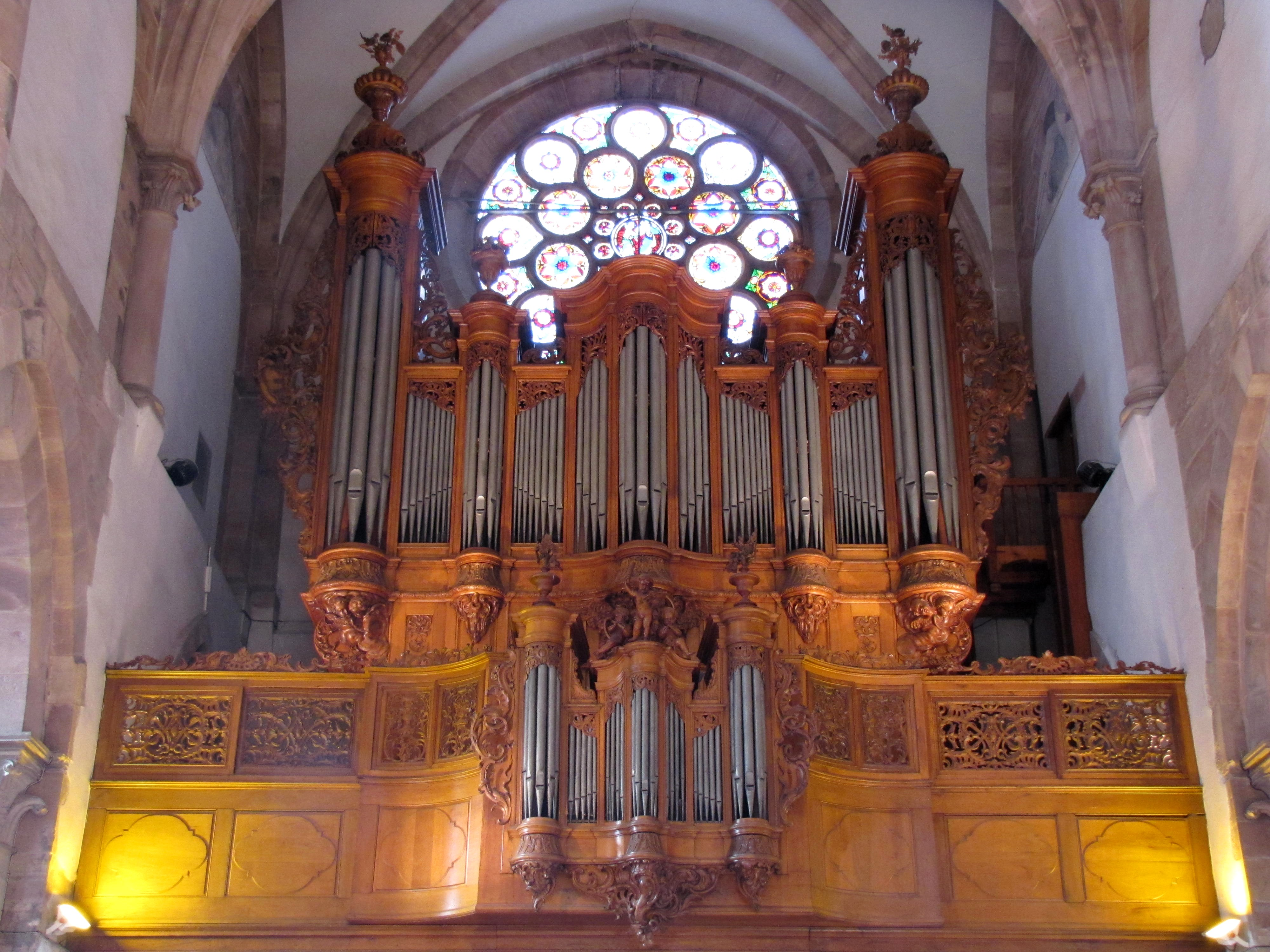 Alsace, Bas-Rhin, Église protestante Saint-Thomas de Strasbourg, 4 rue Martin-Luther (PA00085032).Orgue et garde-corps Jean-André Silbermann (1740): This object is classé Monument Historique in the base Palissy, database of the French furniture patrimony of the French ministry of culture, under the references PM67000347, buffet+garde-corps PM67000348 buffet+garde-corps and instrument PM67000969 instrument.